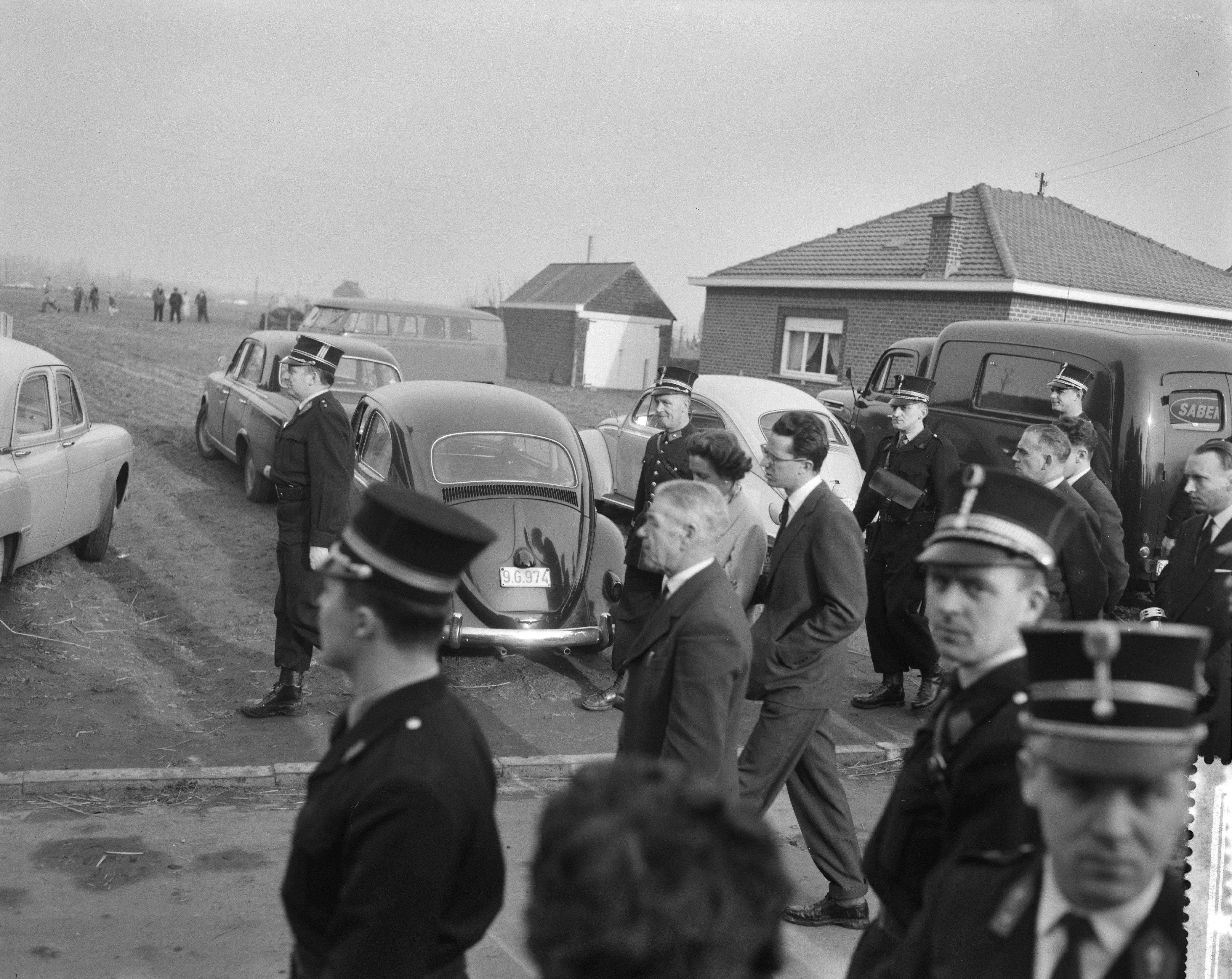 Collectie / Archief : Fotocollectie Anefo Reportage / Serie : [ onbekend ] Beschrijving : Ramp met Sabenavliegtuig bij Brussel, overzicht van de wrakstukken, Koning Boudewijn en Konining Fabiola op plaats van de ramp Datum : 15 februari 1961 Locatie : Brussel Trefwoorden : Rampen, overzichten Persoonsnaam : Boudewijn, koning van België Instellingsnaam : Sabena Fotograaf : Behrens, Herbert / Anefo Auteursrechthebbende : Nationaal Archief Materiaalsoort : Negatief (zwart/wit) Nummer archiefinventaris : bekijk toegang 2.24.01.04 Bestanddeelnummer : 912-1031